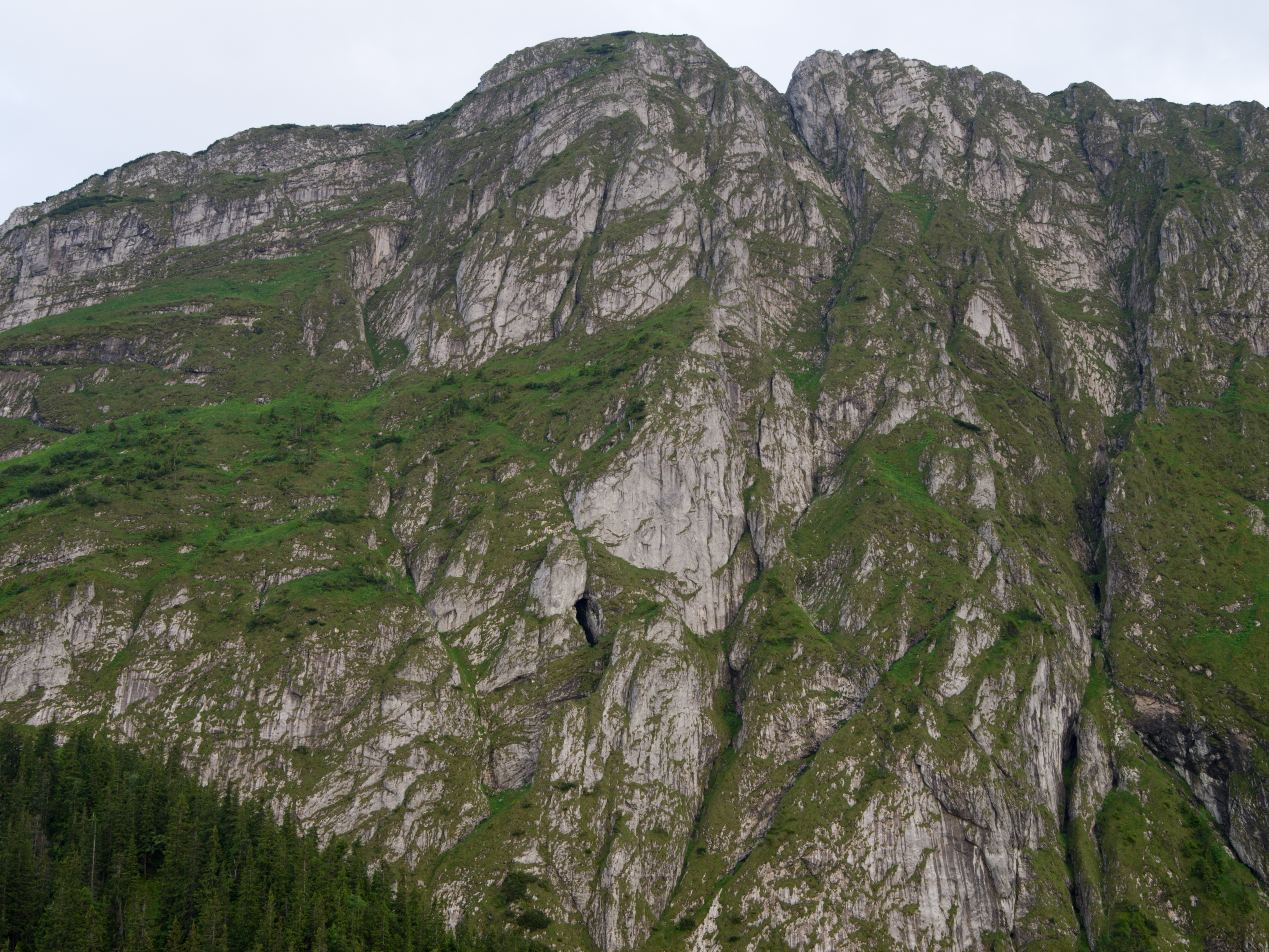 Od lewej: Juhaska Kopa, Juhaska Przehyba, Juhaska Turnia, Szczerbinka i wschodnia część grani szczytowej Długiego Giewontu. Poniżej środka zdjęcia otwór Jaskini Juhaskiej.